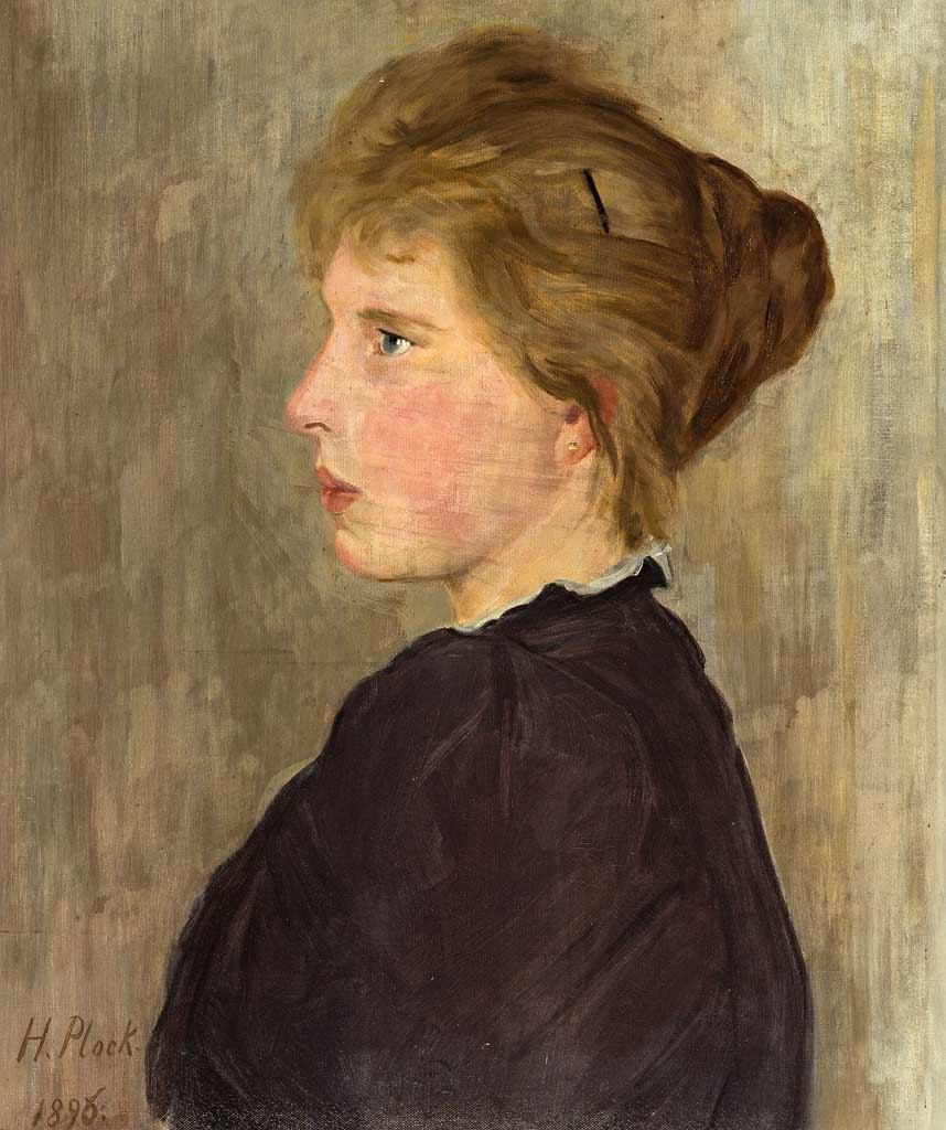 Portrait einer jungen Dame im Profil nach links. Öl/Lwd. 60,5 x 50 cm. Signiert und 1896 datiert